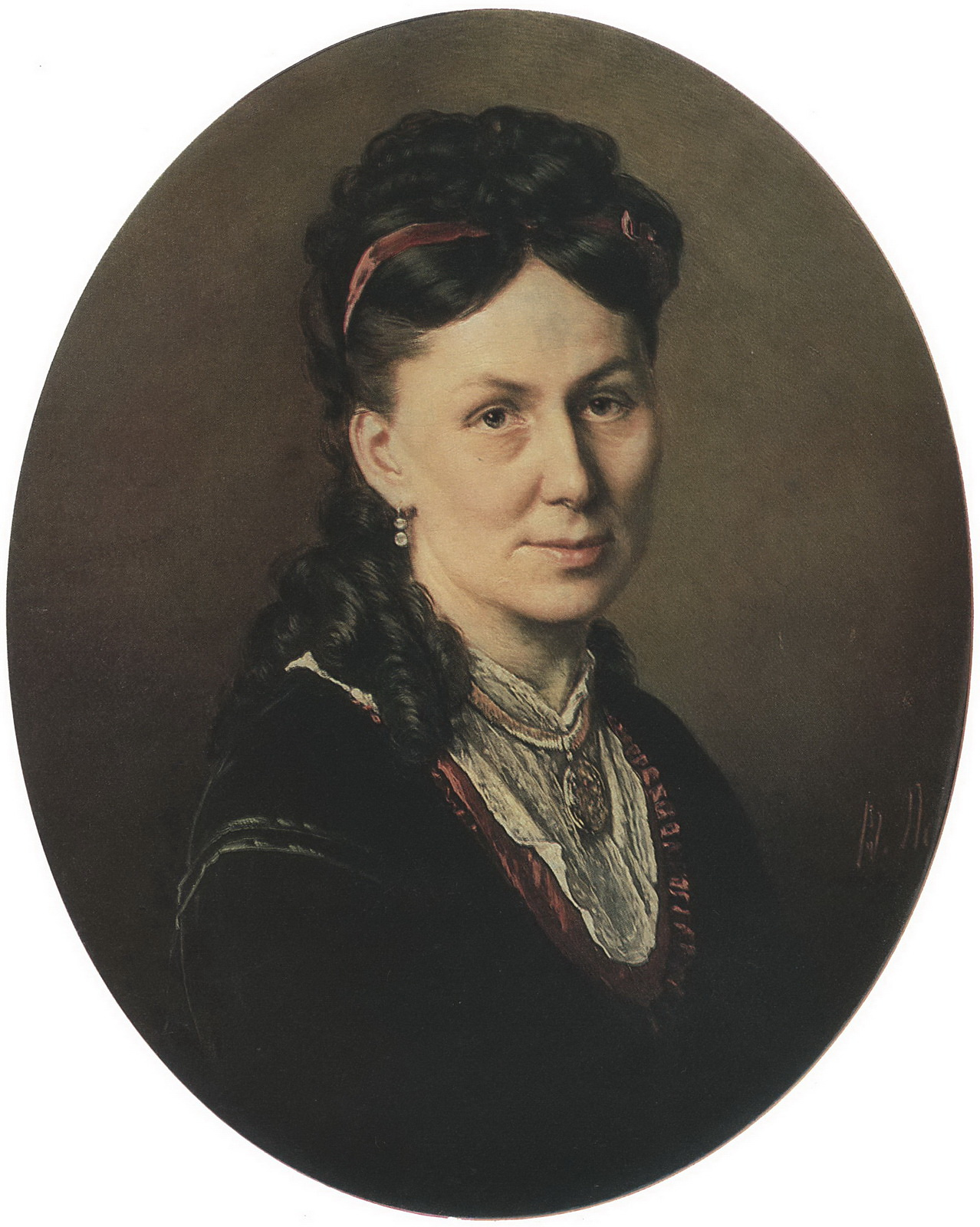 Портрет Авдотьи Кузнецовой